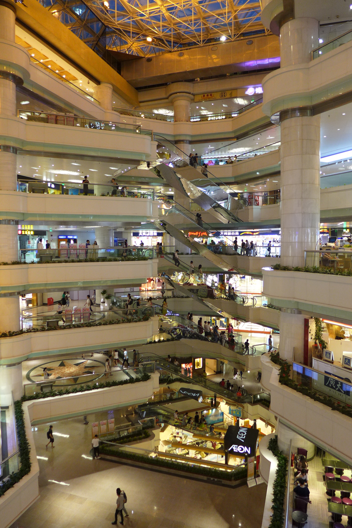 Teemall Atrium